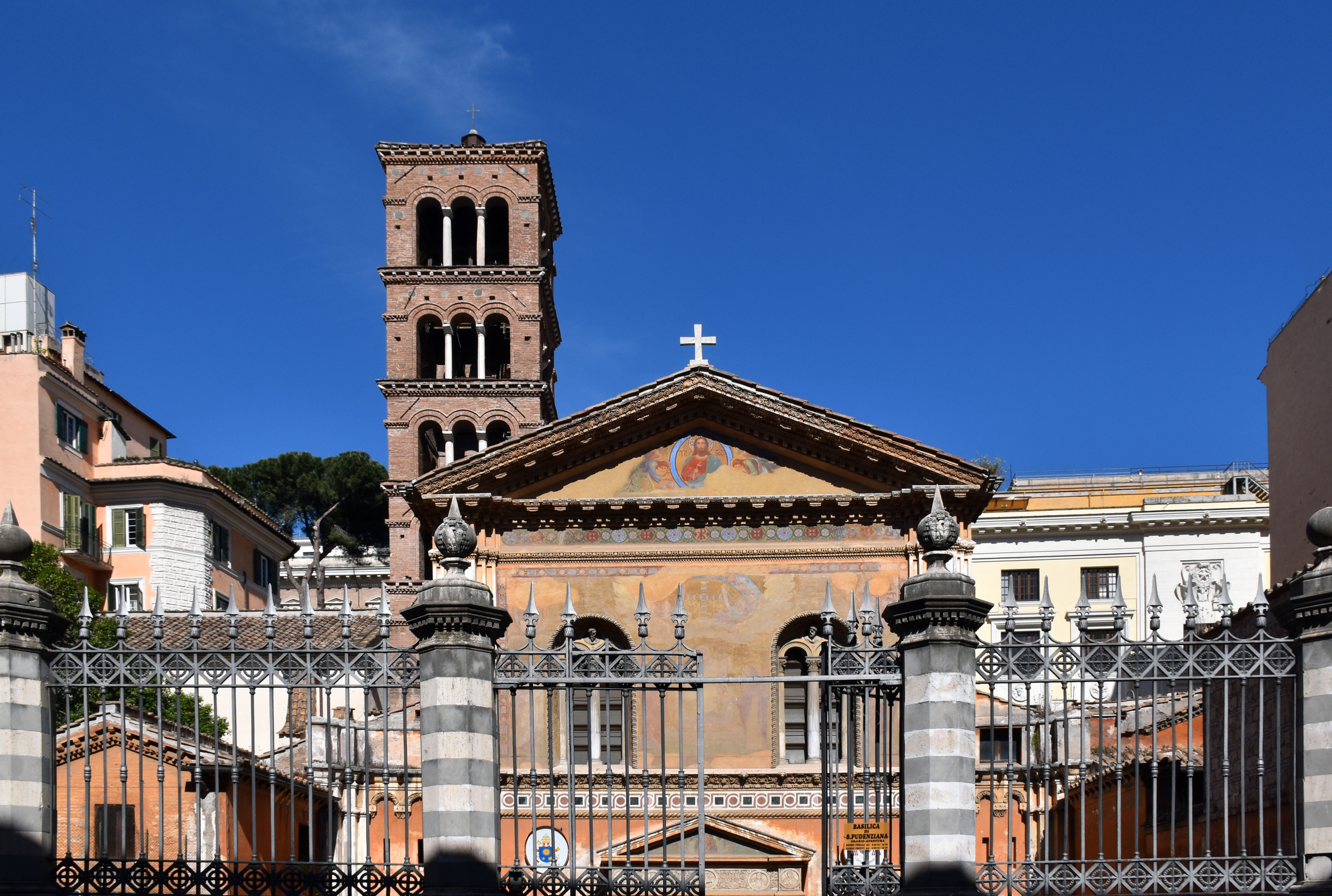 Sainte Pudentienne ( Santa Pudenziana ) à Rome.